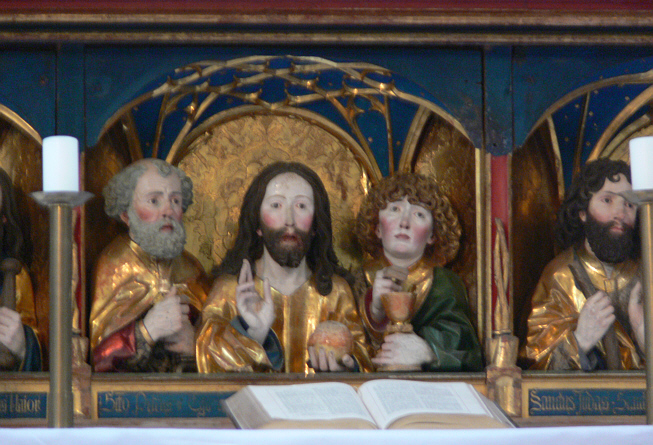 Kloster Blaubeuren, Klosterkirche, Chorraum: Hochaltar Predella, Mittelteil: Christus und Apostel